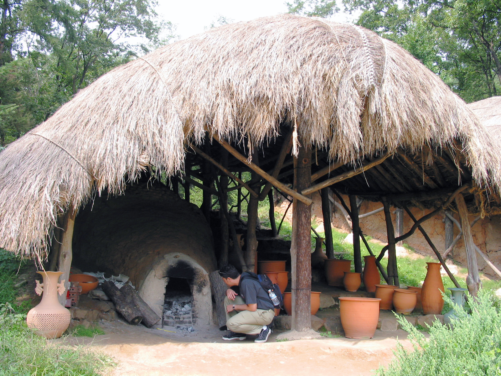 Kiln for pottery in Yangdong village, Gyeongju, Gyeongsangbuk-do, Korea. 경상북도 경주 양동 민속마을.